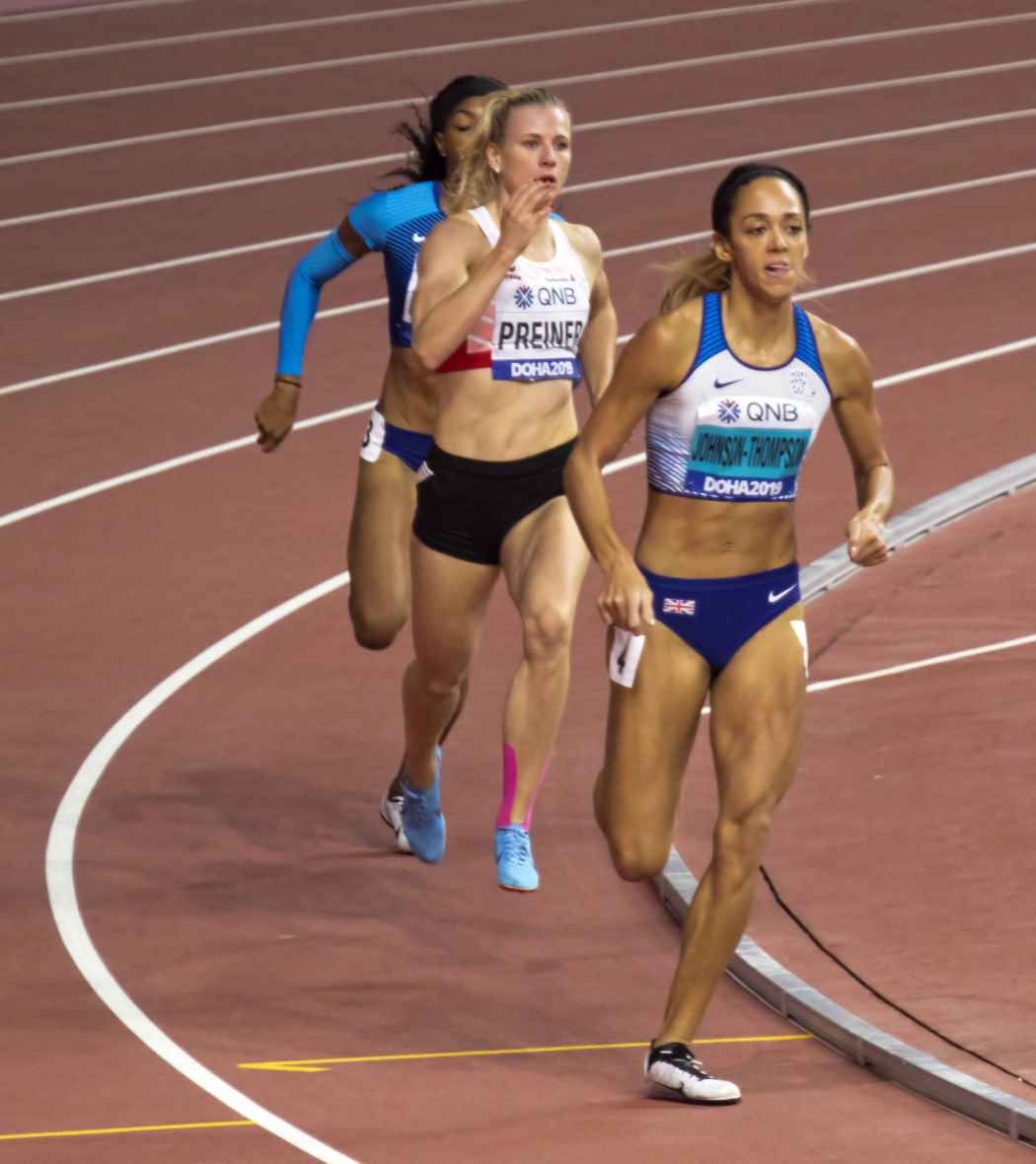 DOH70161 heptathlon 800m KJT preiner